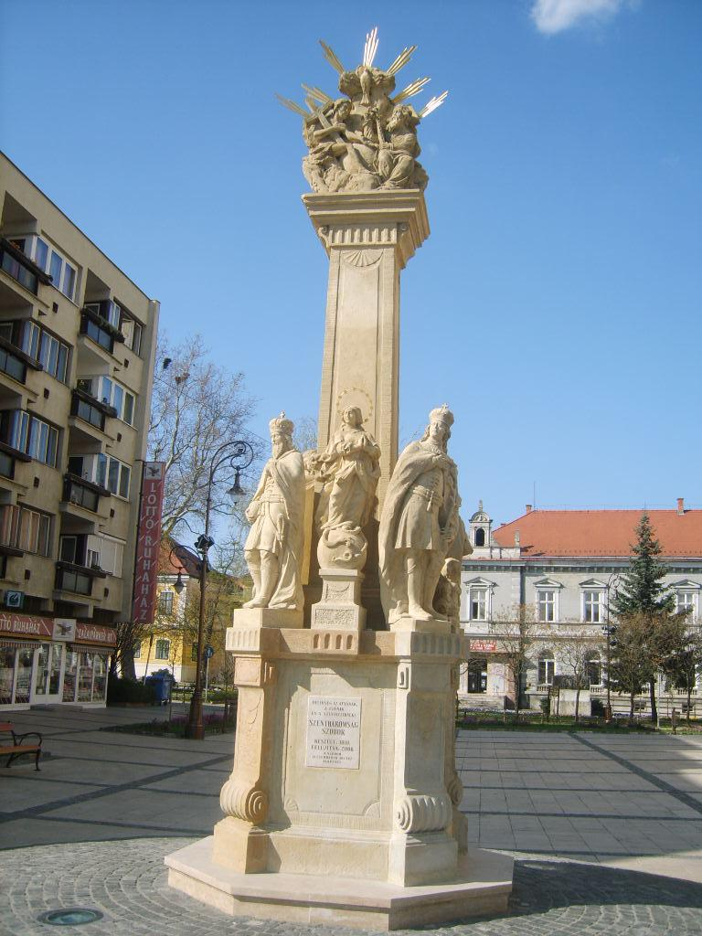 A Mindszenty téren álló Szentháromság szobor Zalaegerszegen